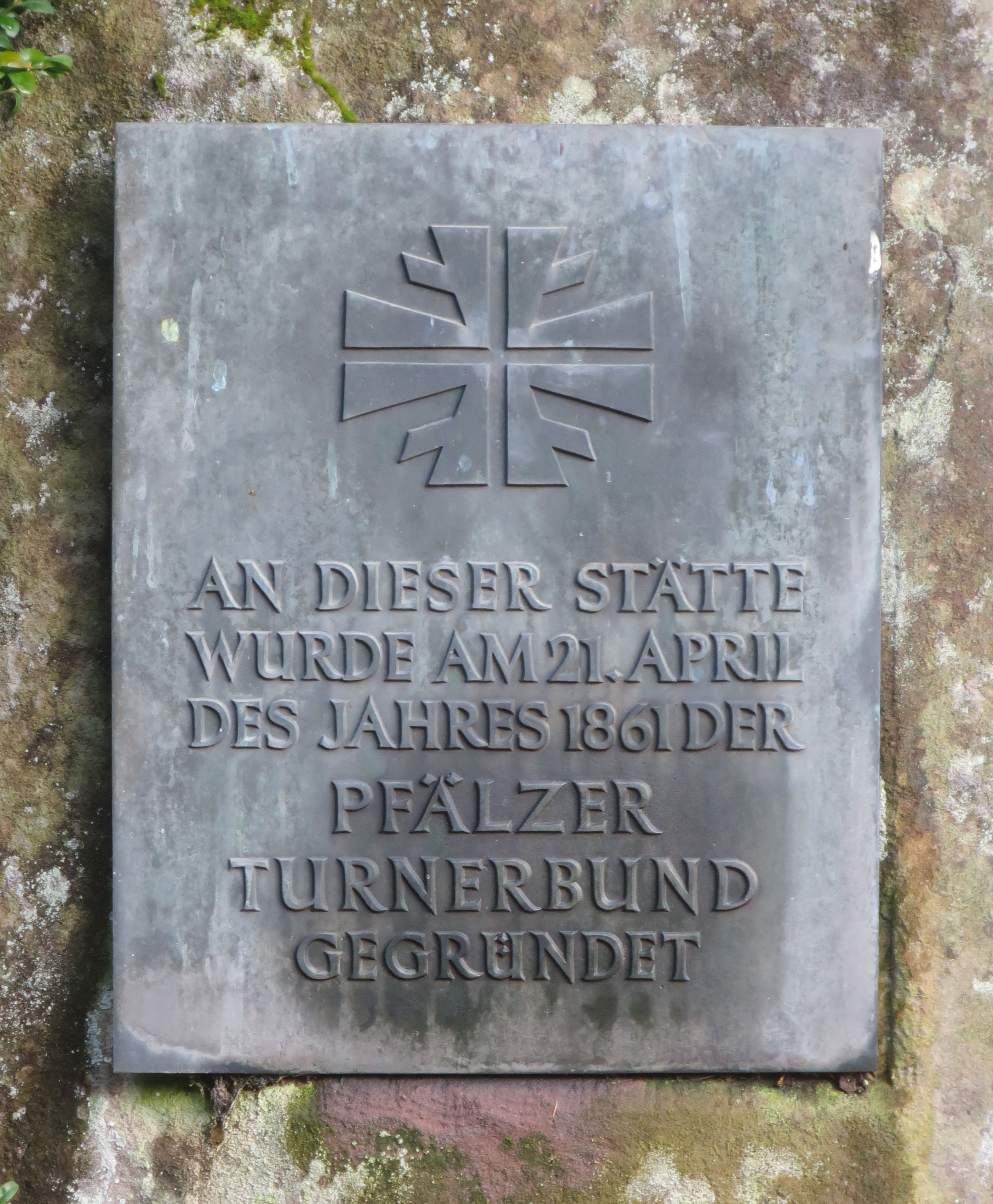 Erinnerungsplakette an die Gründung des Pfälzischen Turnerbundes vor der Villa Denis, Diemerstein.